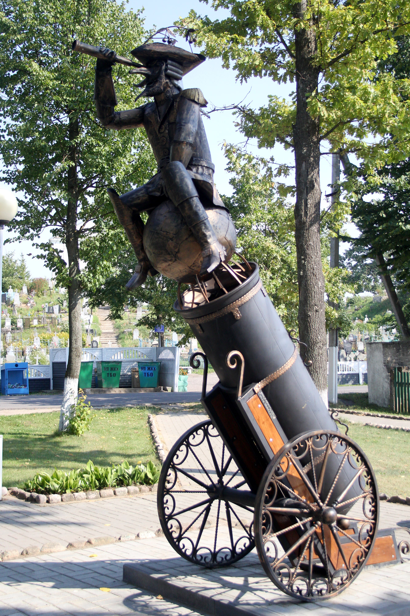 Беларуская (тарашкевіца): Помнік Мюнхгаўзену ў Глыбокім